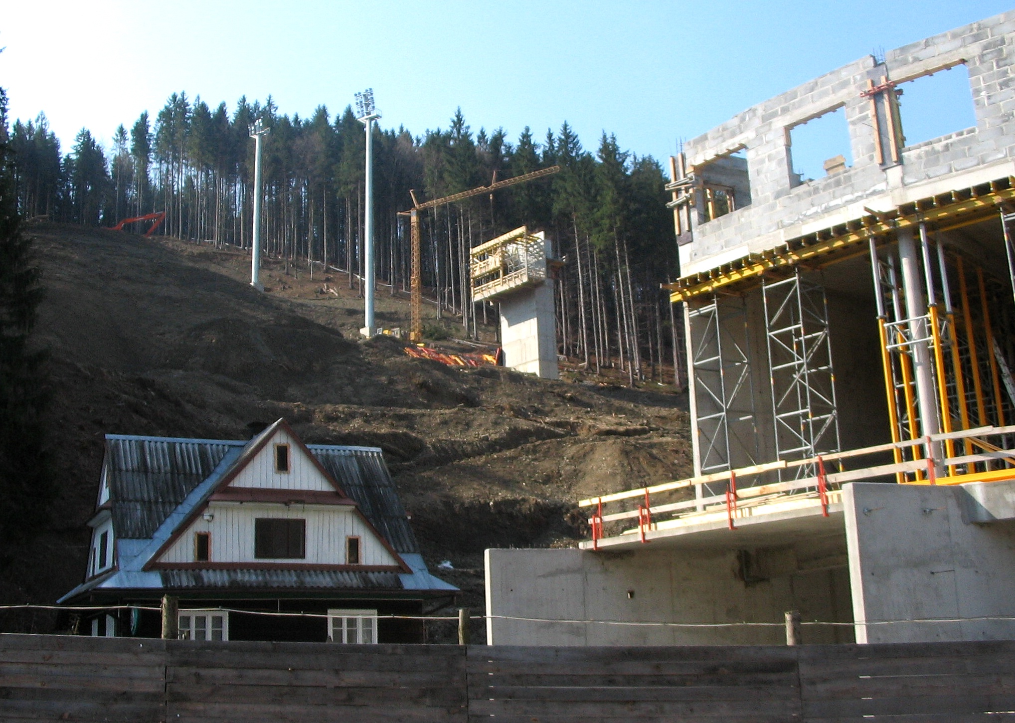 Skocznia narciarska w Wiśle Malince - w budowie